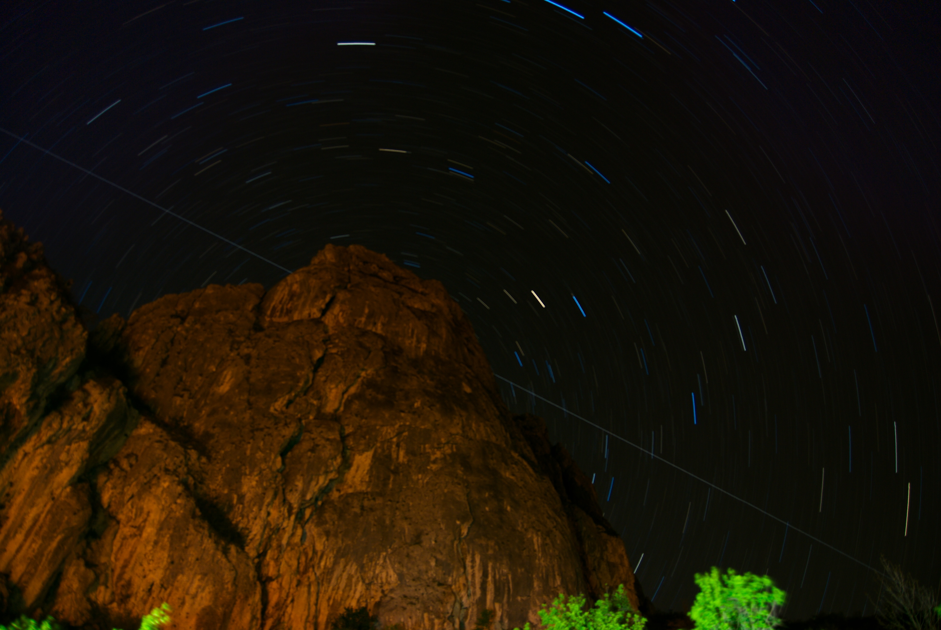 SKY la Ramet